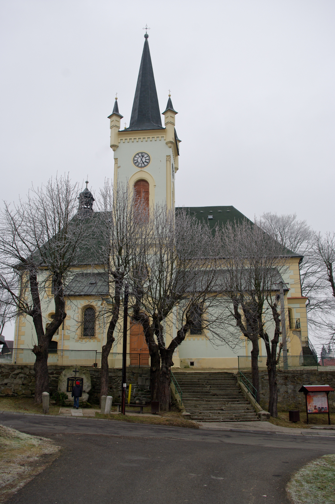 Kostel sv. Petra a Pavla, nám. Karla IV., Krajková